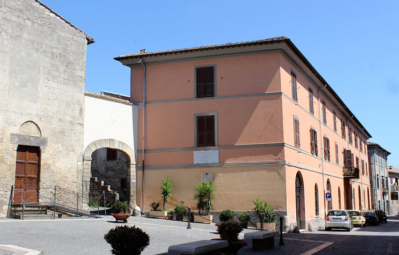 Casa nativa - Palazzo Marzi - Tarquinia (VT) - Archivio famiglia Marzi